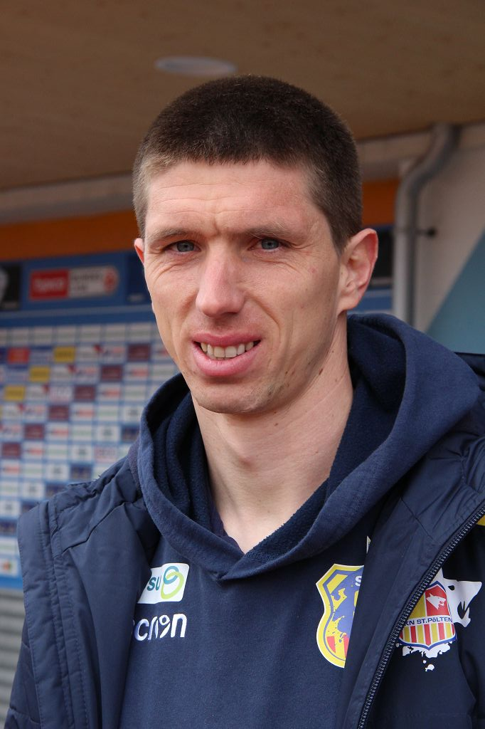 Roko Mislov (SKN)